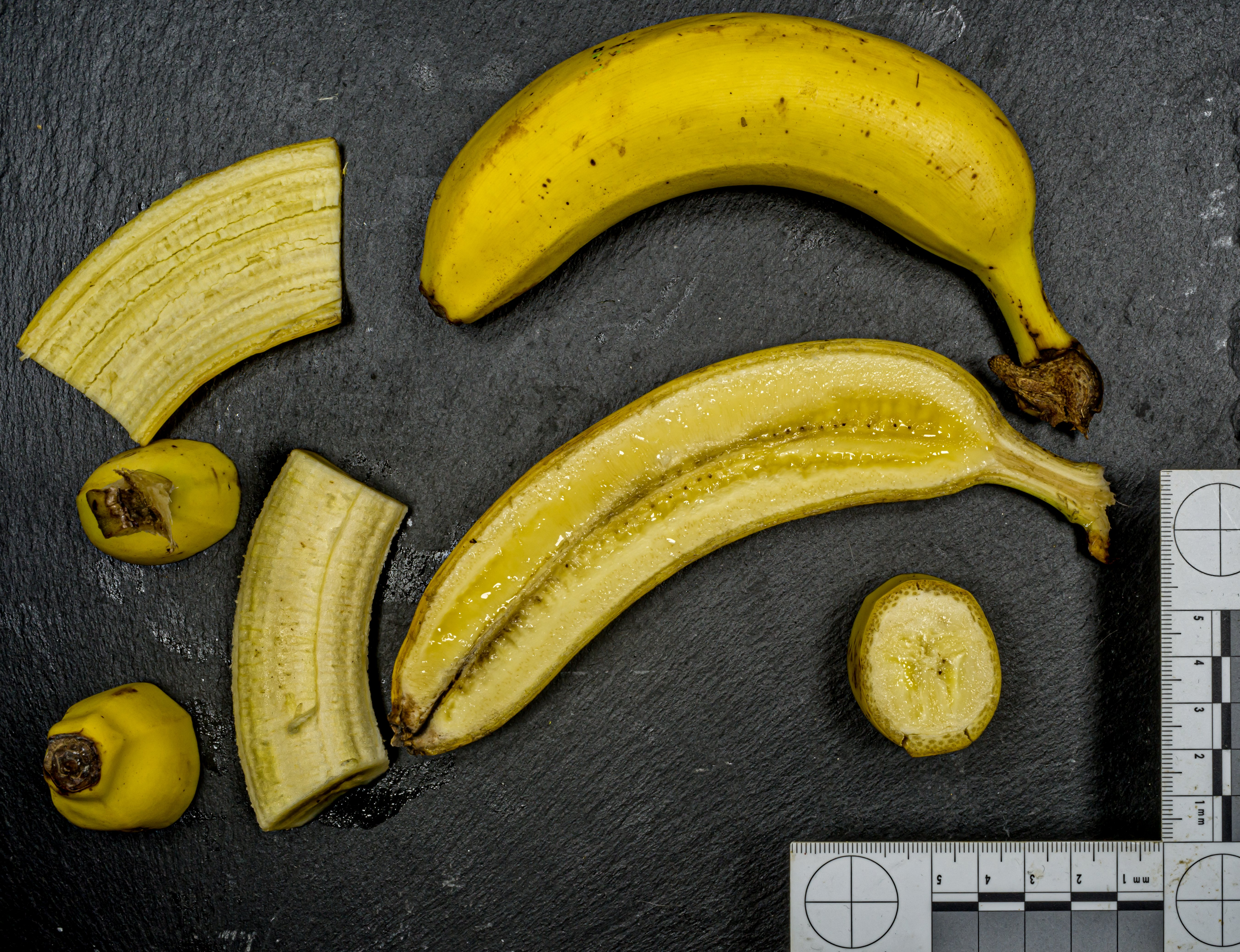 Querschnitte durch Früchte. Banane